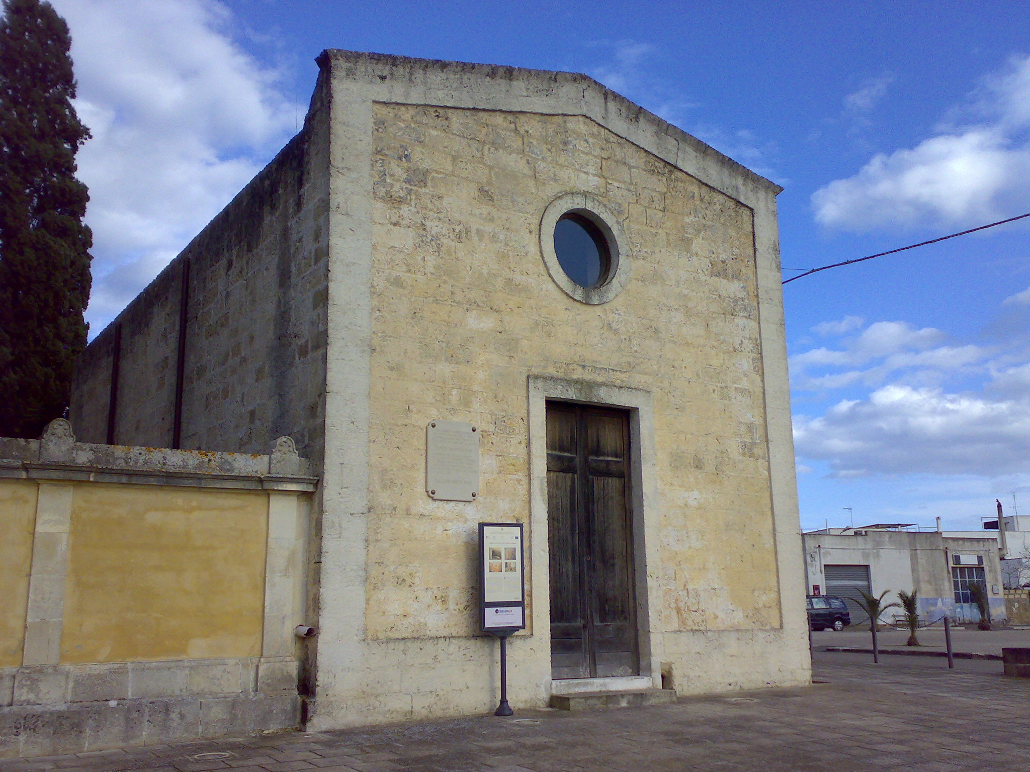 Cappella di Santa Marina di Miggiano